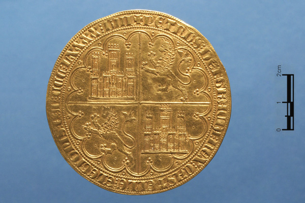 Gran Dobla de Pedro I (Reinos hispanocristianos). Número de inventario: 1867-21-2.